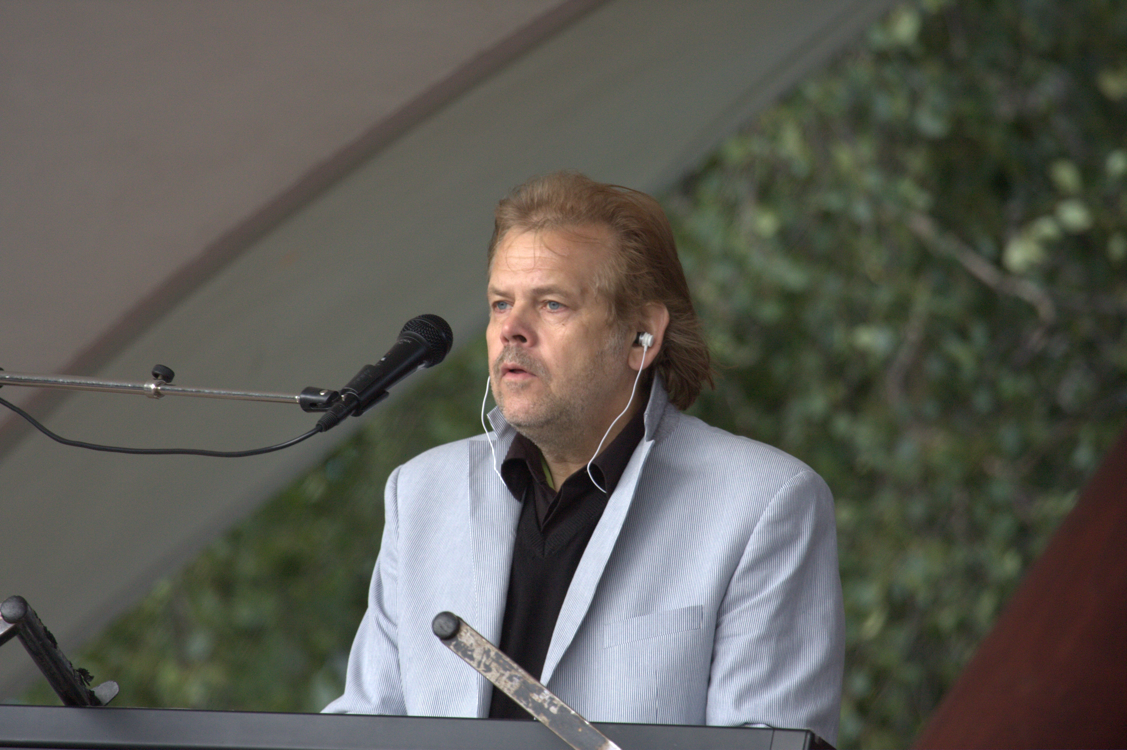 Heimo Mäntynen suomalainen urkujensoittaja ja säestäjä